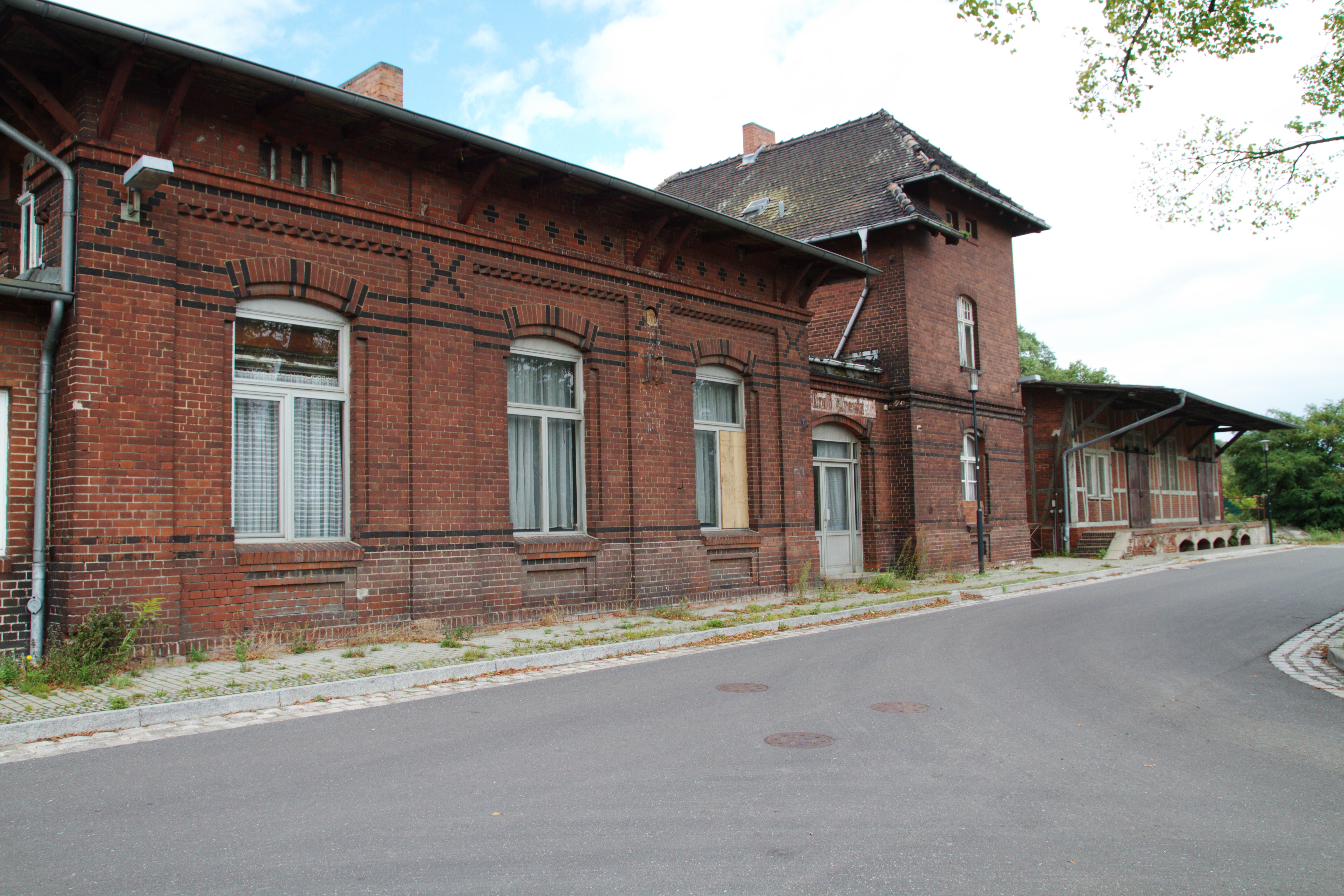 Bahnhofsanlage in Groß Kreutz: Empfangsgebäude und Güterabfertigung mit Rampe